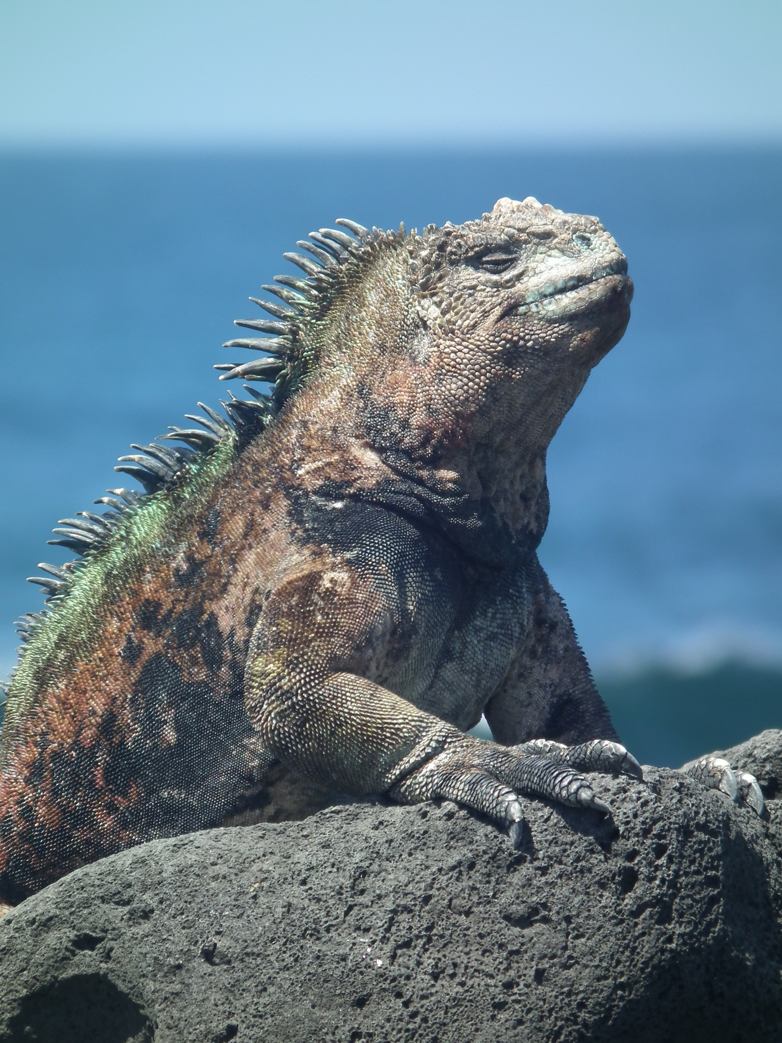 Amblyrhynchus cristatus